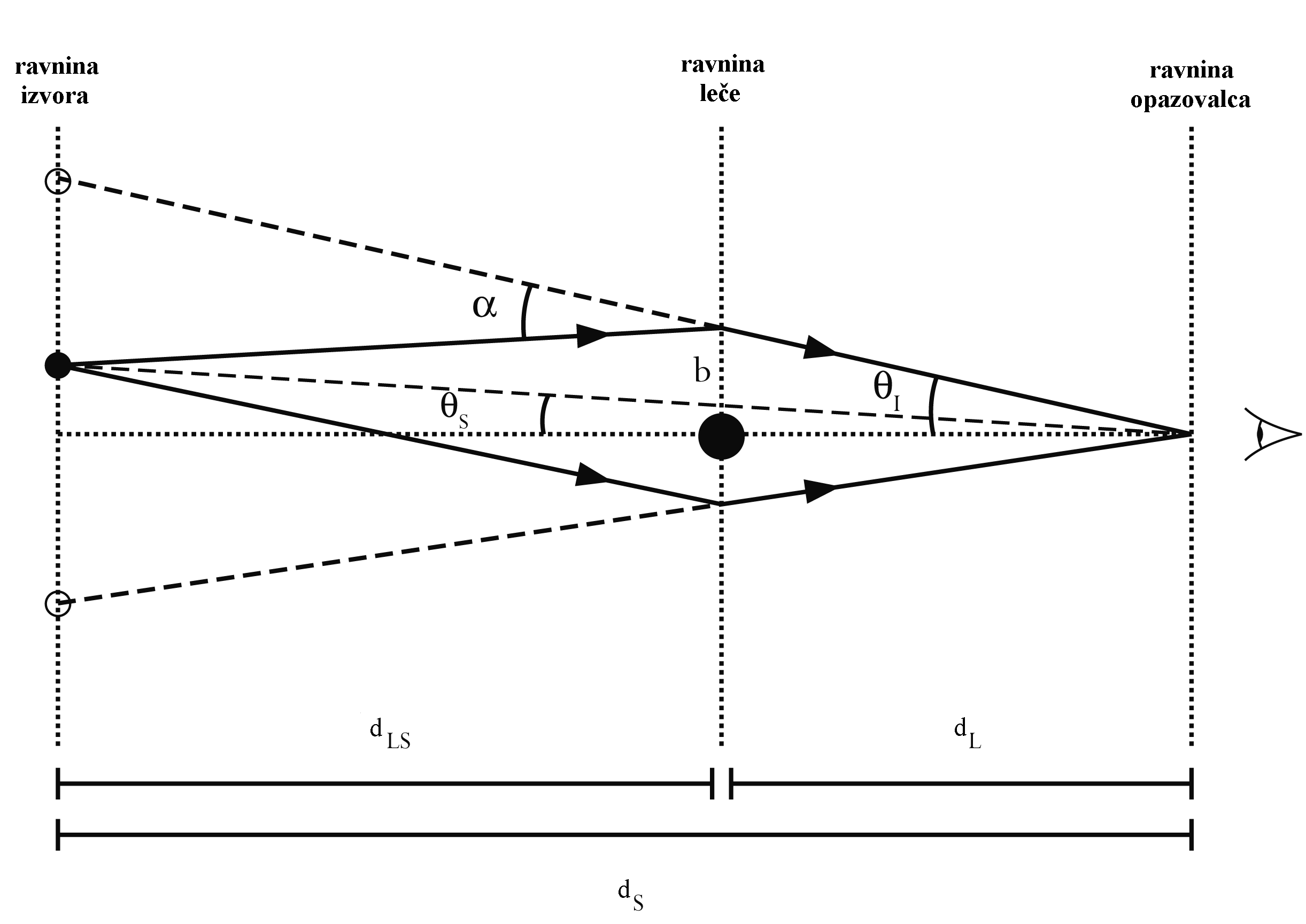 Geometrija gravitacijskih leč.